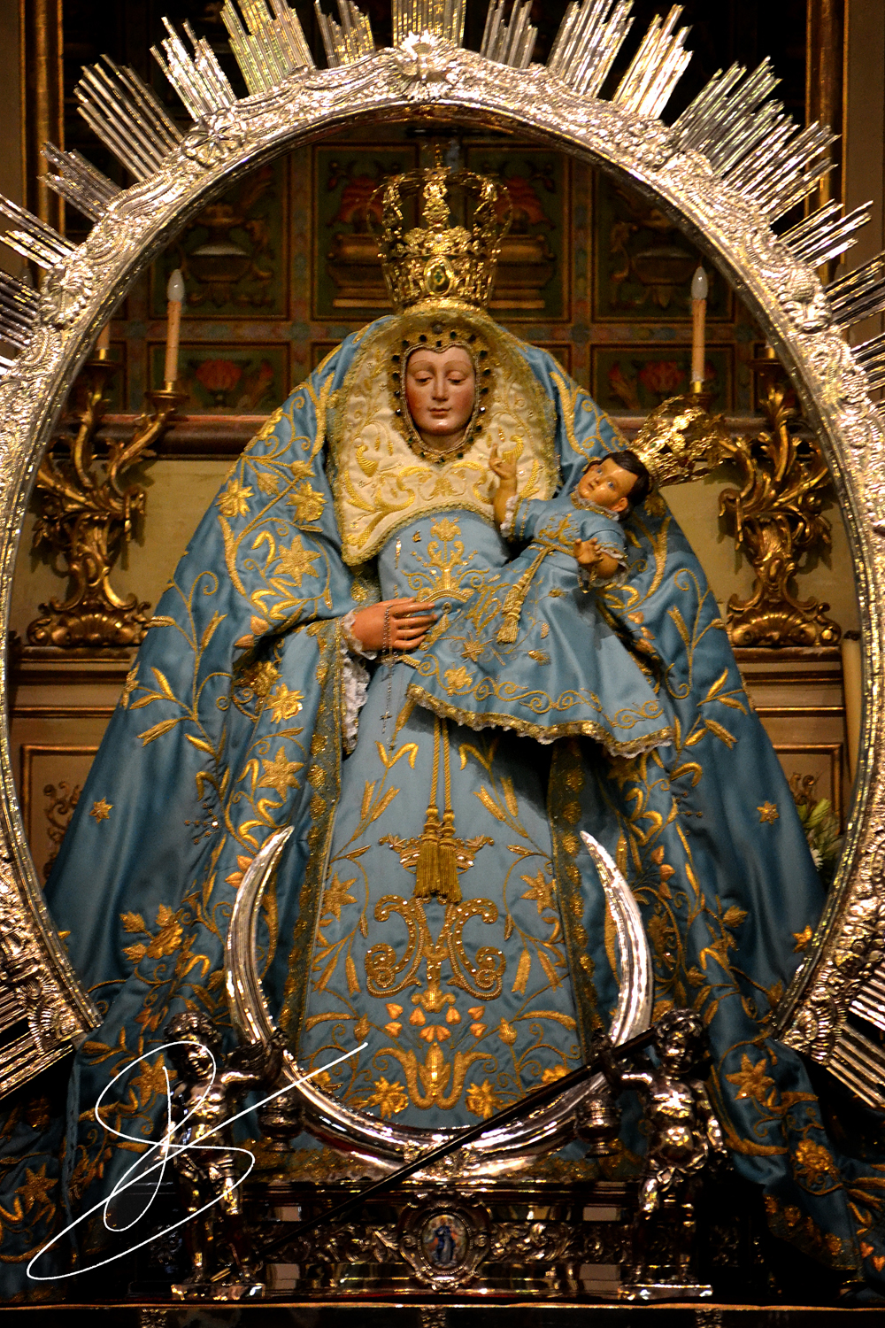 Nuestra Señora de Guía Coronada